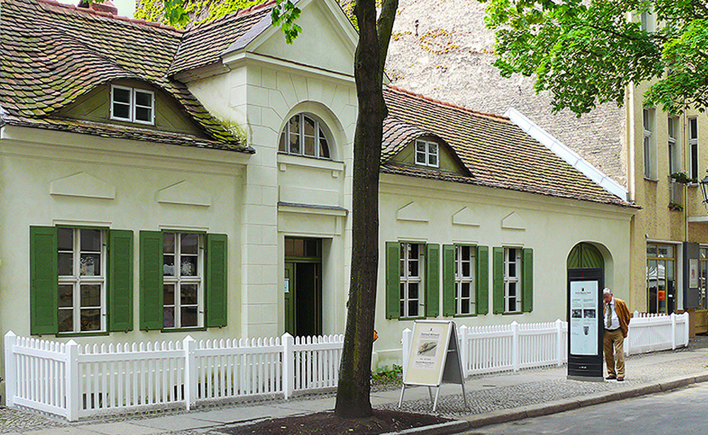 Keramikmuseum Berlin